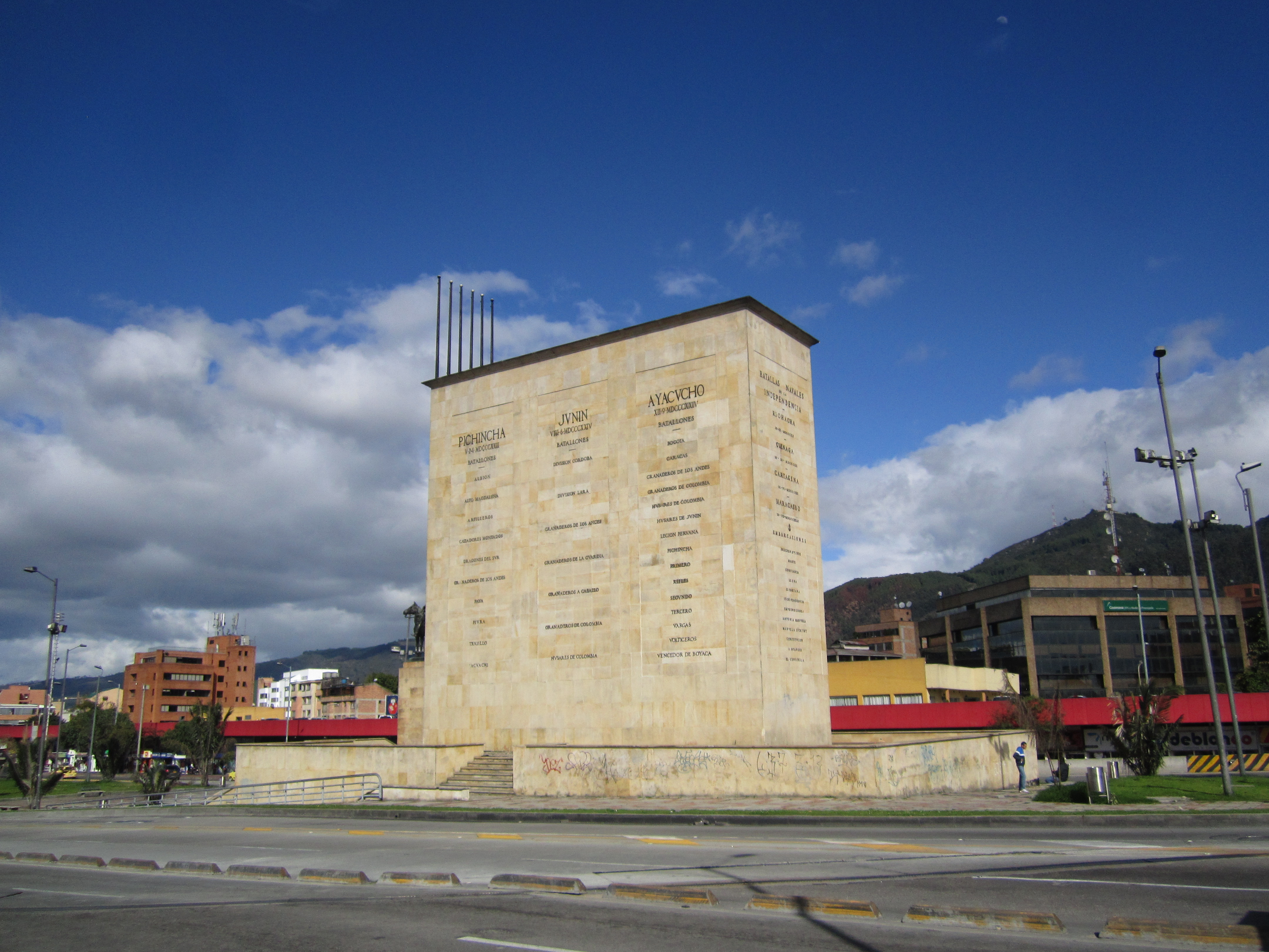 Bogota Monumento a Los Héroes